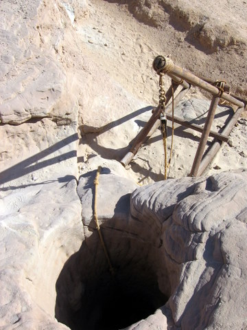 pit